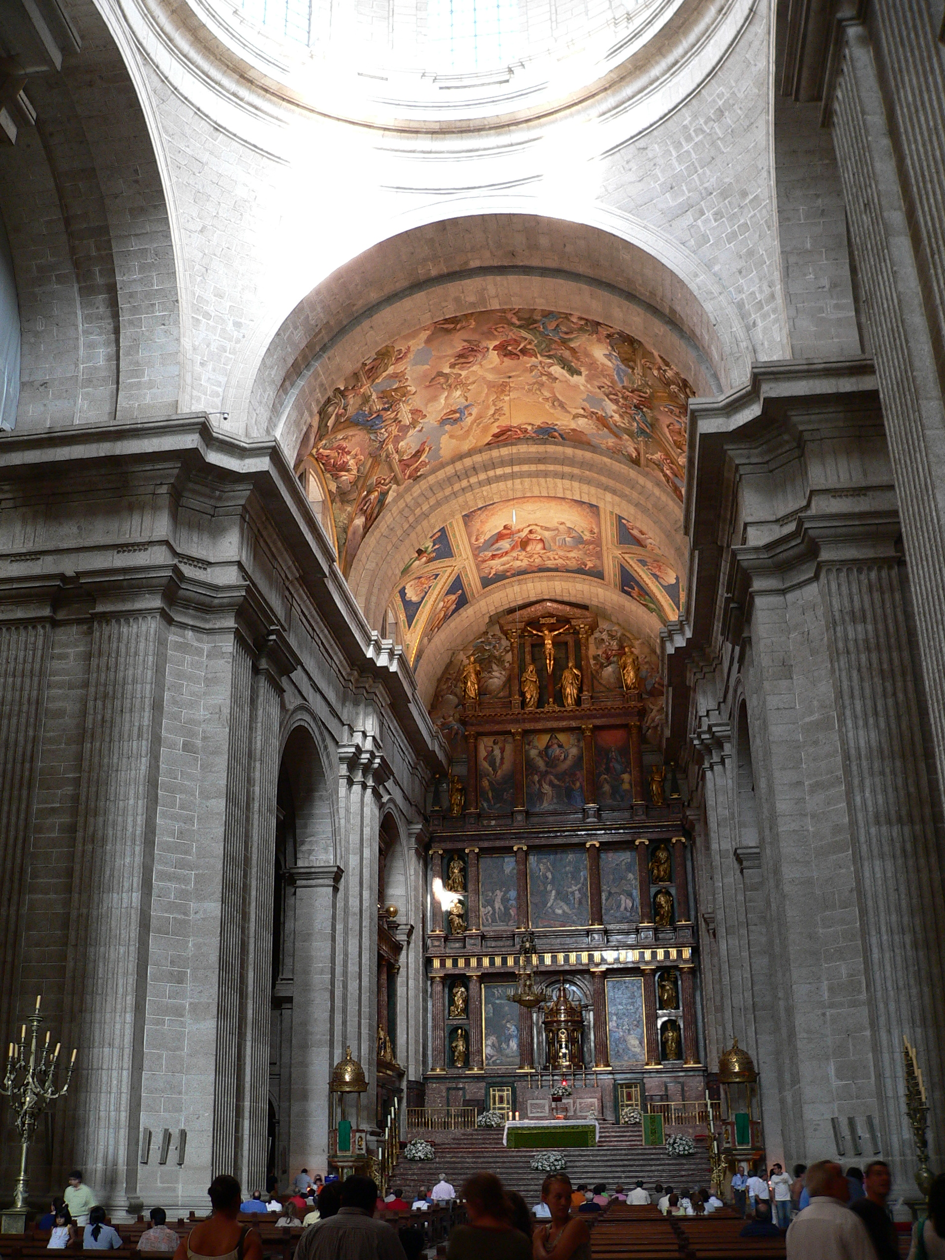 Altar Mayor de la Basílica Description: Inside the Basilica Subject: El Escorial Basilica City : El Escorial Country : Spain Photographer: © Manuel González Olaechea y Franco Shot date : August, 13th, 2006